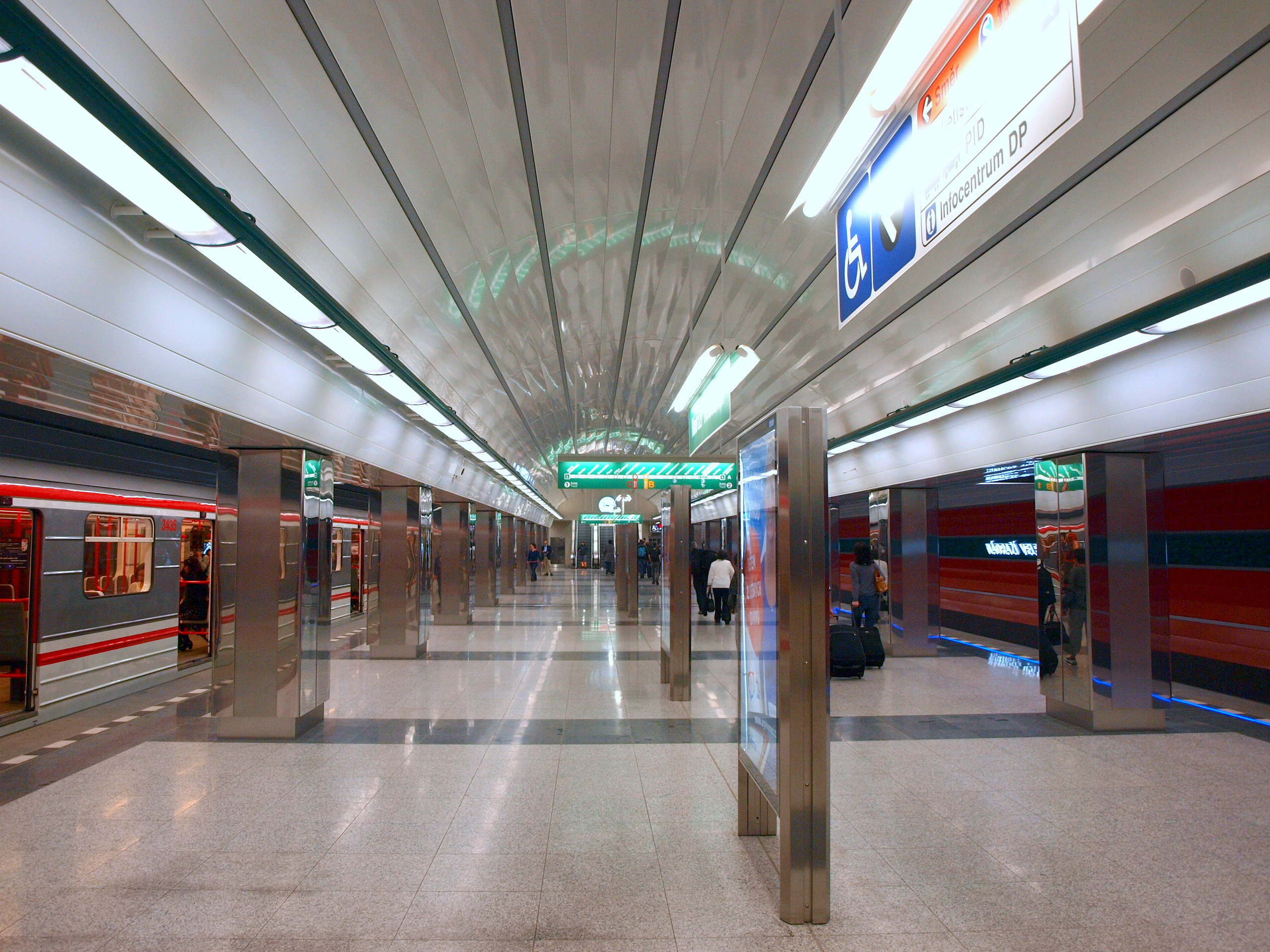 Satnice Nádraží Veleslavín